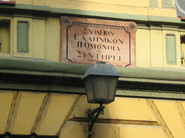 Спомен плоча на кући коју су Грци поклонили 1869. године Српској православној великој гимназији у Новом Саду.